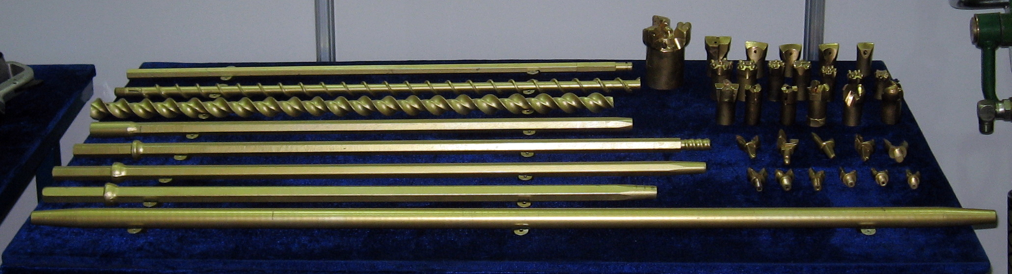 Фото з виставки Вугілля-Майнінг 2010